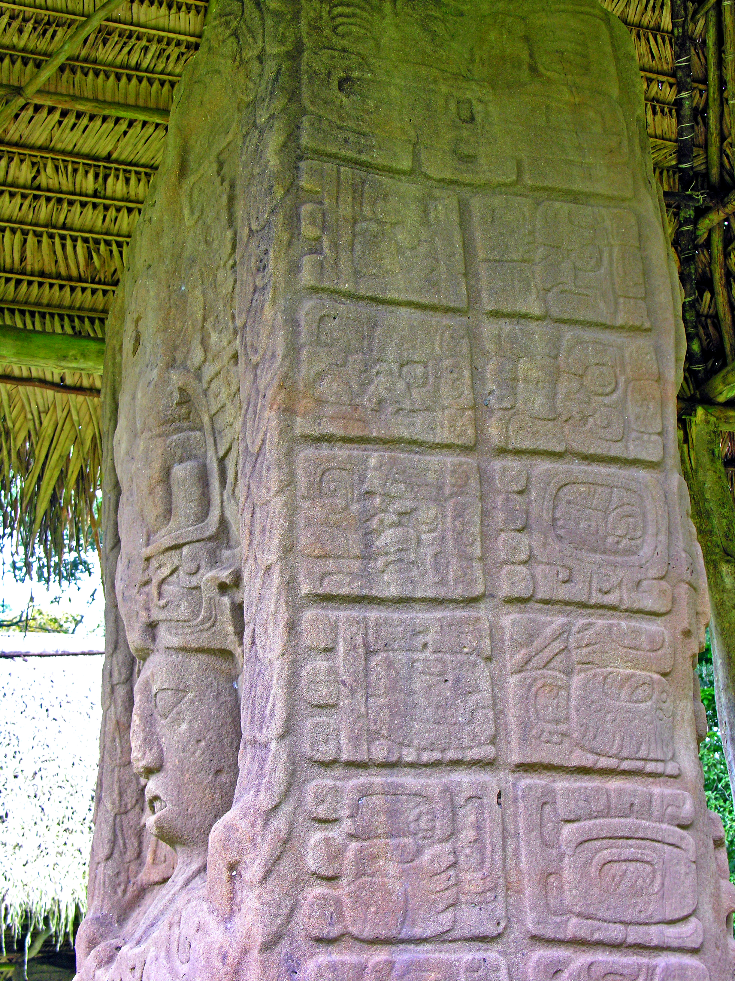 Guatemala-0572